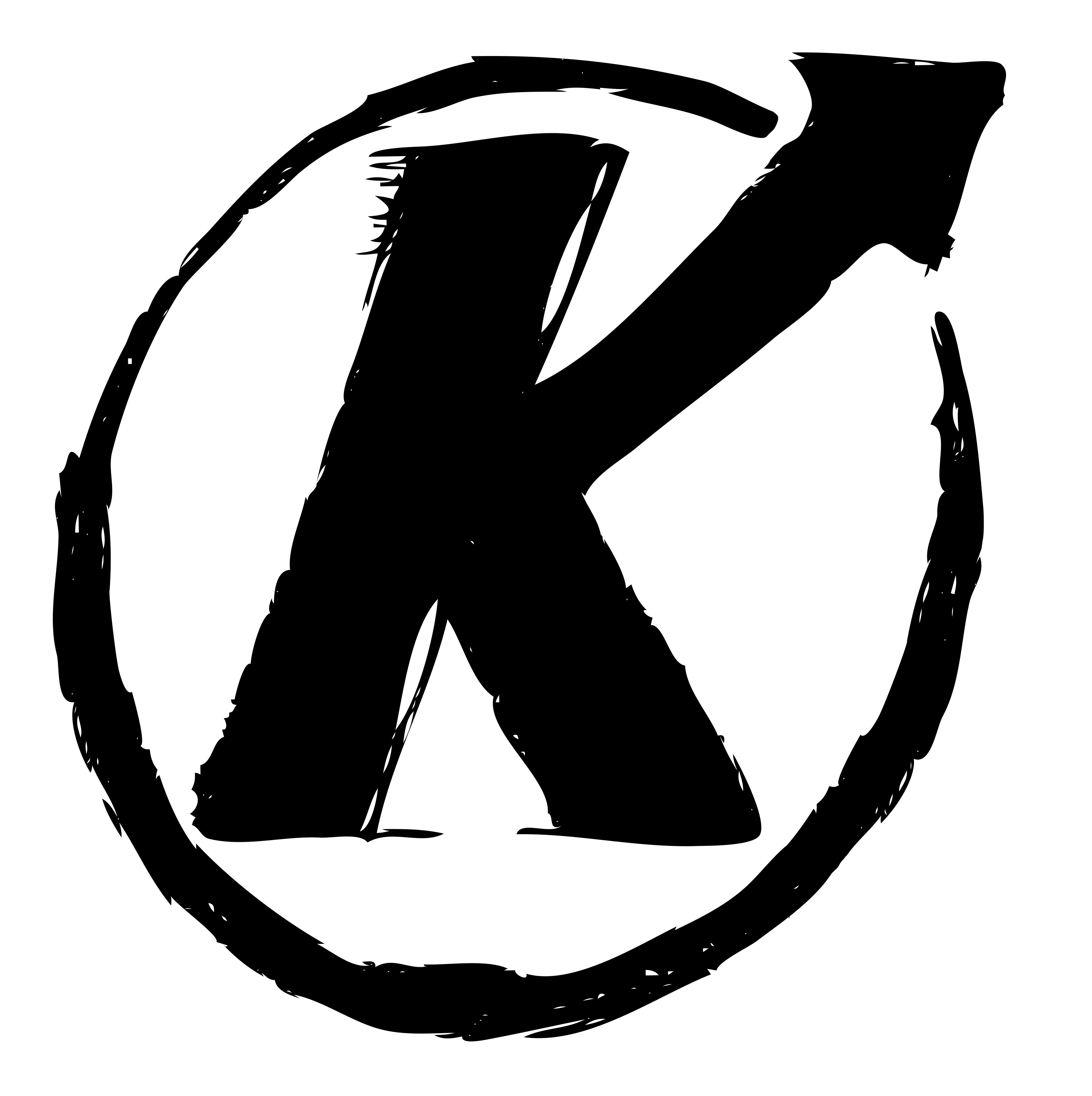 Logo - Koneckonců